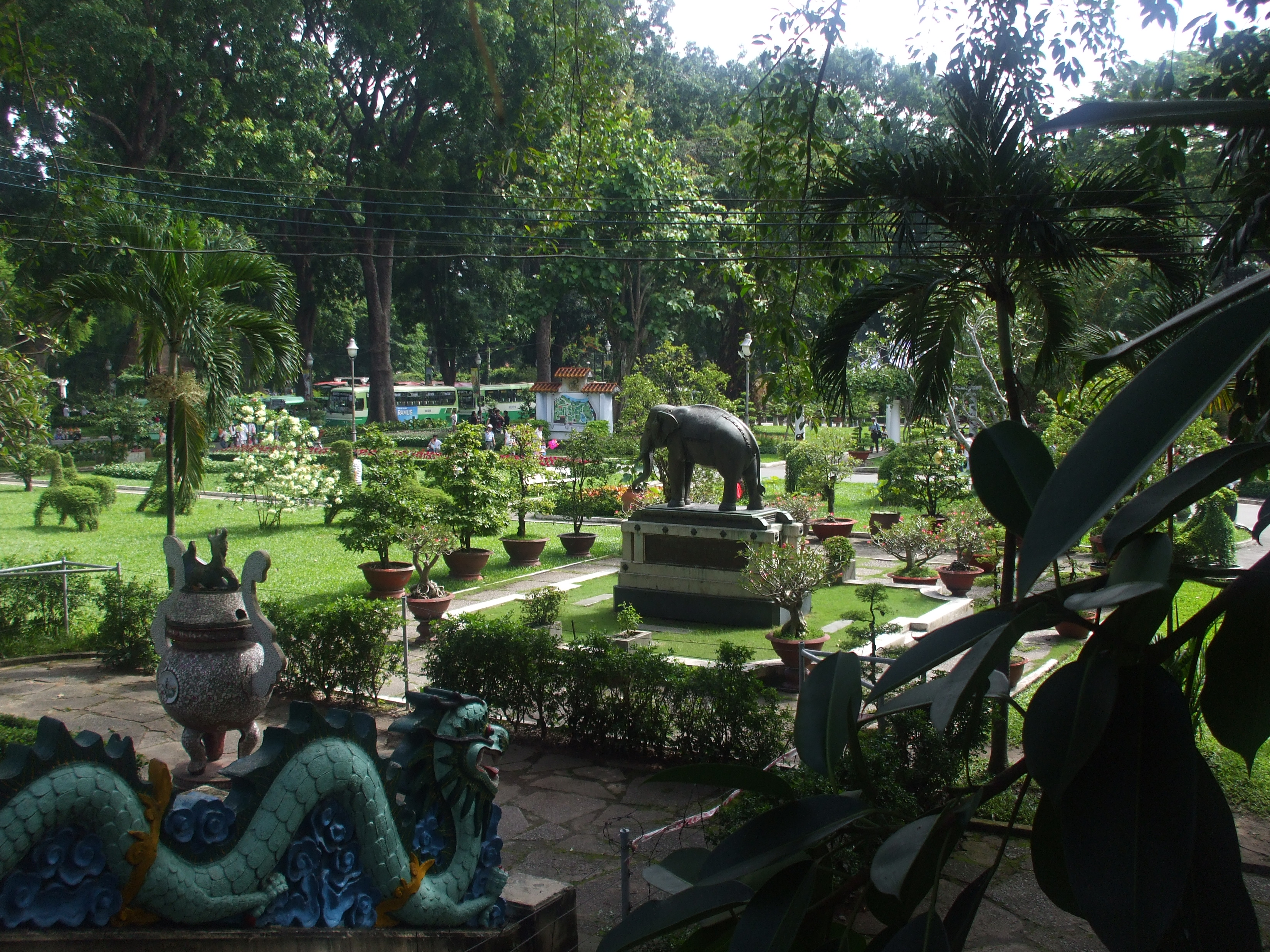 Một phần nhỏ trong khuôn viên của Thảo Cầm Viên Sài Gòn, Việt Nam.